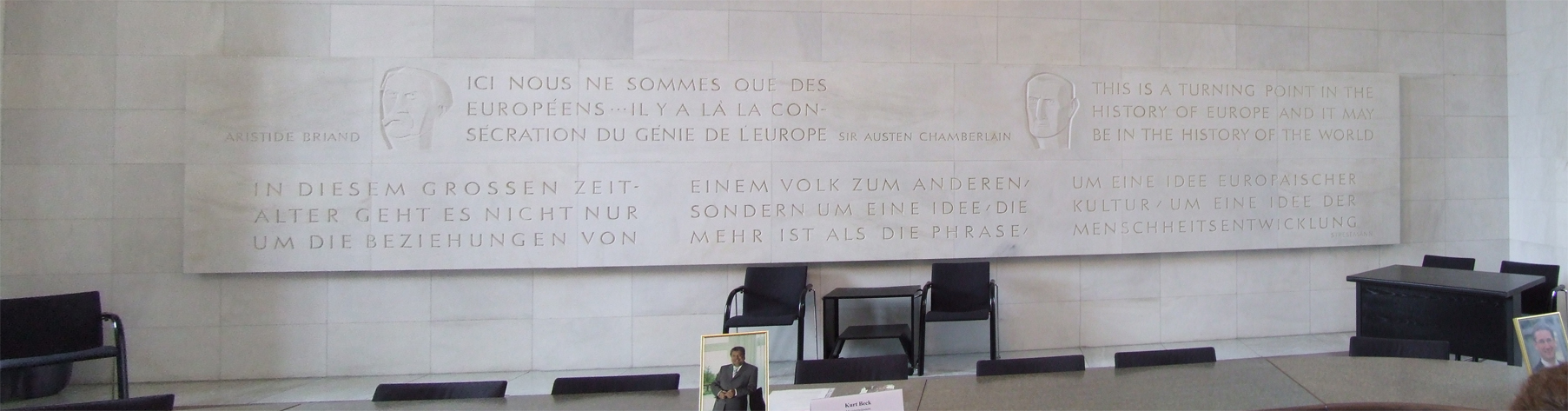 Wandtafel im Kabinettsaal des Neues Zeughaus Mainz Inschrift: Ici nous ne sommes que des Européens. Il y a là la consécration du génie de l'Europe. (Aristide Briand) This is a turning point in the history of europe and it may be in the history of the world. (Sir Austen Chamberlain) In diesem großen Zeitalter geht es nicht nur um die Beziehungen von einem Volk zum Anderen. Sondern um eine Idee. Die mehr ist als die Phrase um eine Idee Europäischer Kultur. Um eine Idee der Menschheitsentwicklung. (Gustav Stresemann)